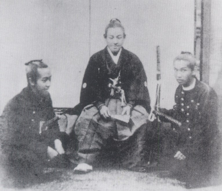 小松宮彰仁親王 Komatunomiya Akihito Shinnou. 仁和寺宮嘉彰時代の写真。